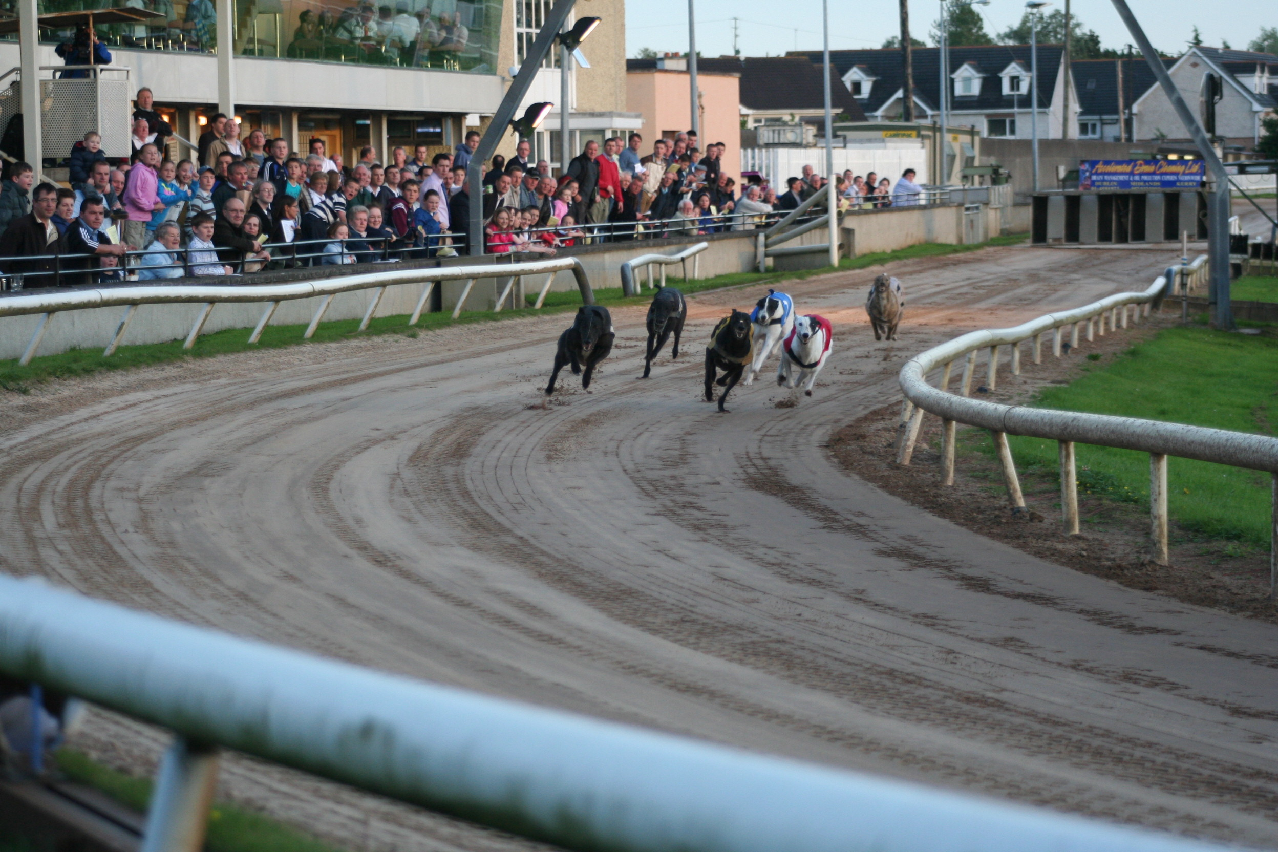 Courses des Levriers Mullingar juillet 2008